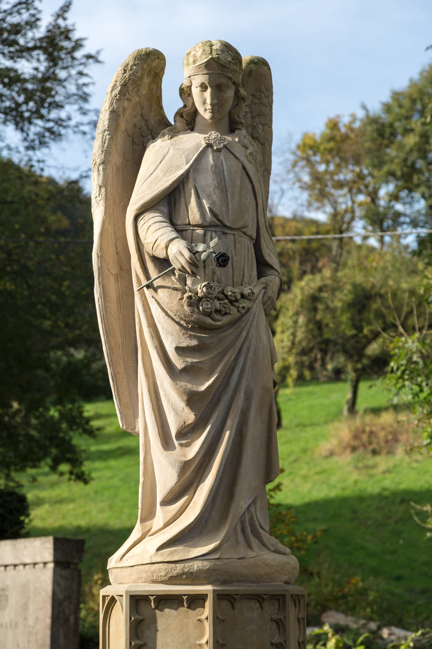 Rösrath, Denkmalnummer 65, Müllenbach-Grabmal, Christoph Heinrich nach der Renovierung im Jahr 2013. Bildhauer: F. Custodis This is a photograph of an architectural monument.